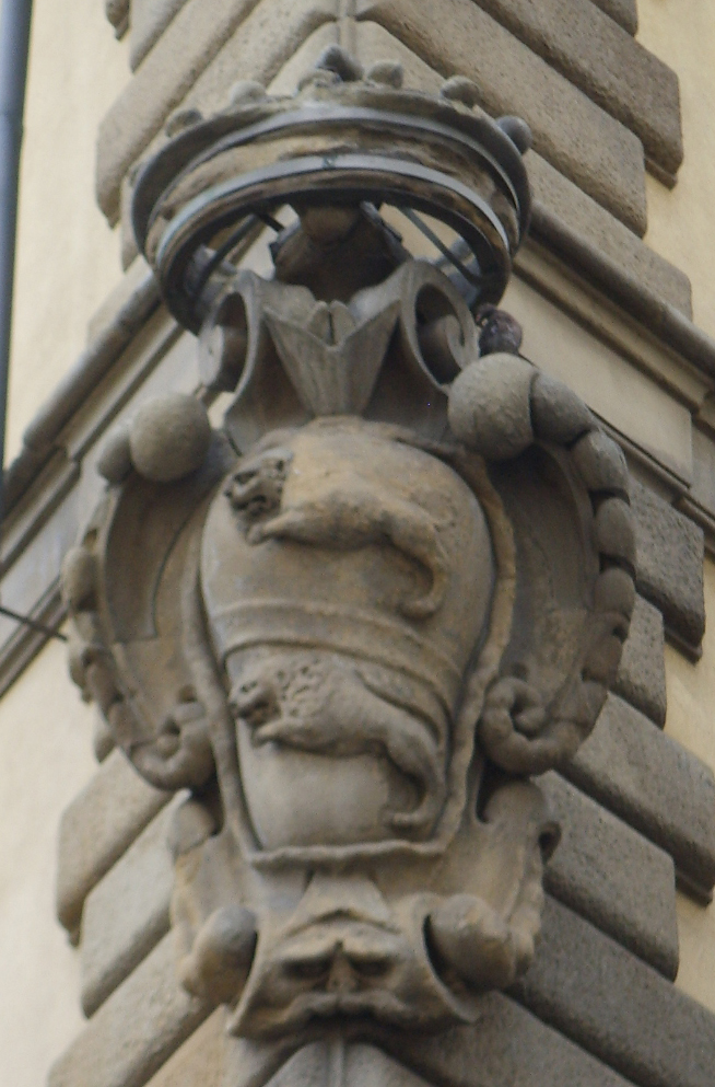 Palazzo_Incontri in Florence